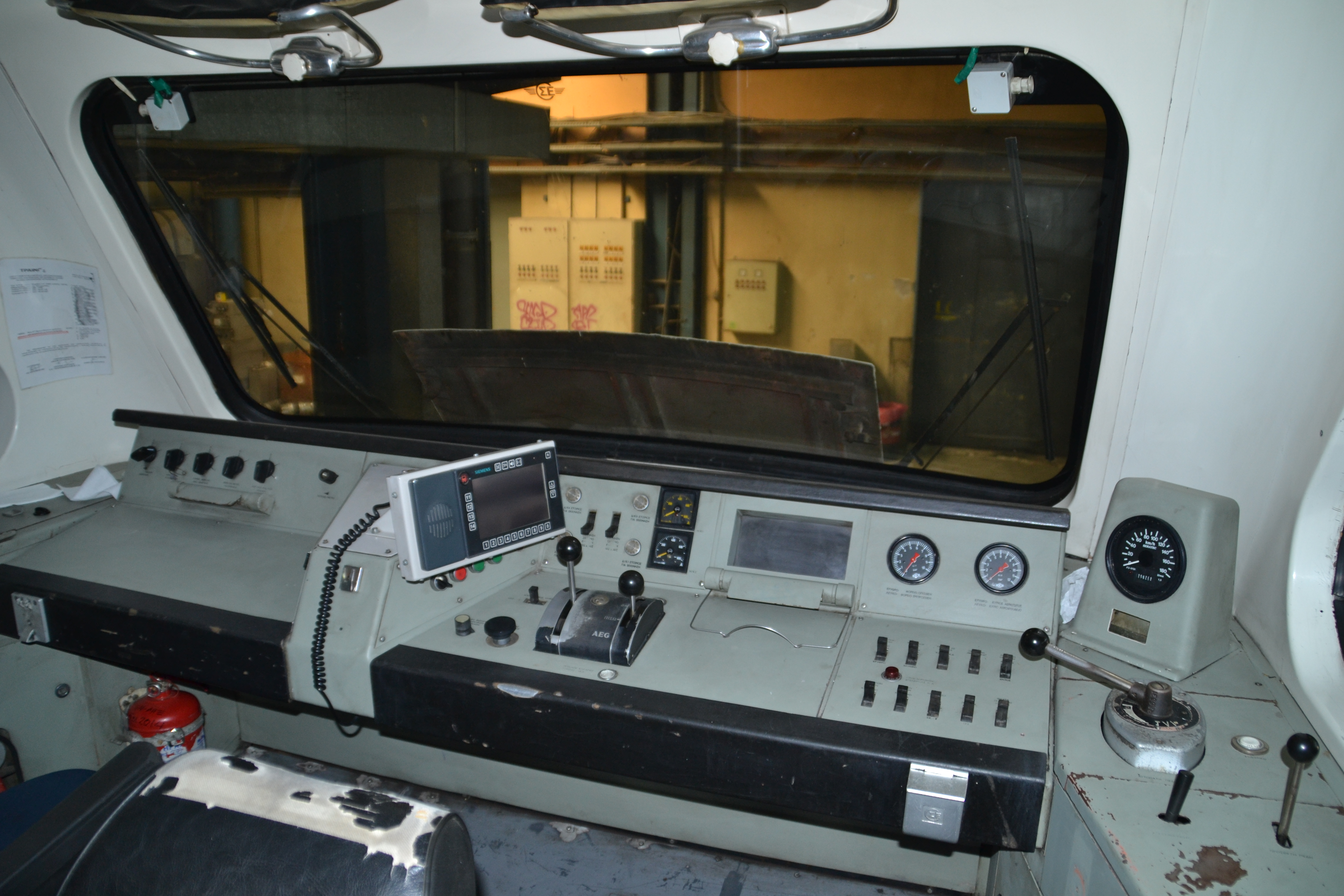 Καμπίνα της μηχανής σειράς 520 στο Αμαξοστάσιο Αγίου Ιωάννη Ρέντη (Μ.Α.Ι.)